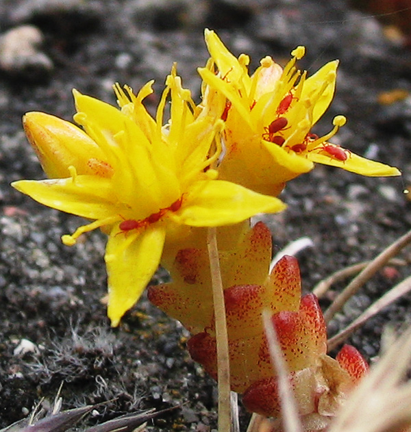 Beschreibung: Scharfer Mauerpfeffer (Sedum acre) Fotograf: Darkone, 16. Juni 2005